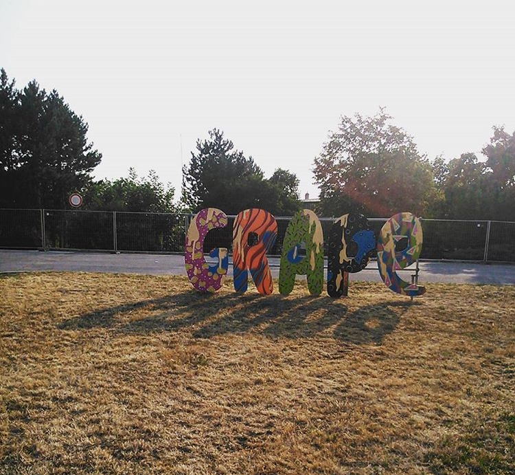 Nápis Grape vo festivalovom dizajne z roku 2015 na letisku Piešťany